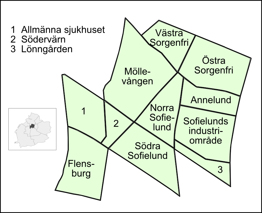 Delområden i Södra Innerstaden, Malmö 2009